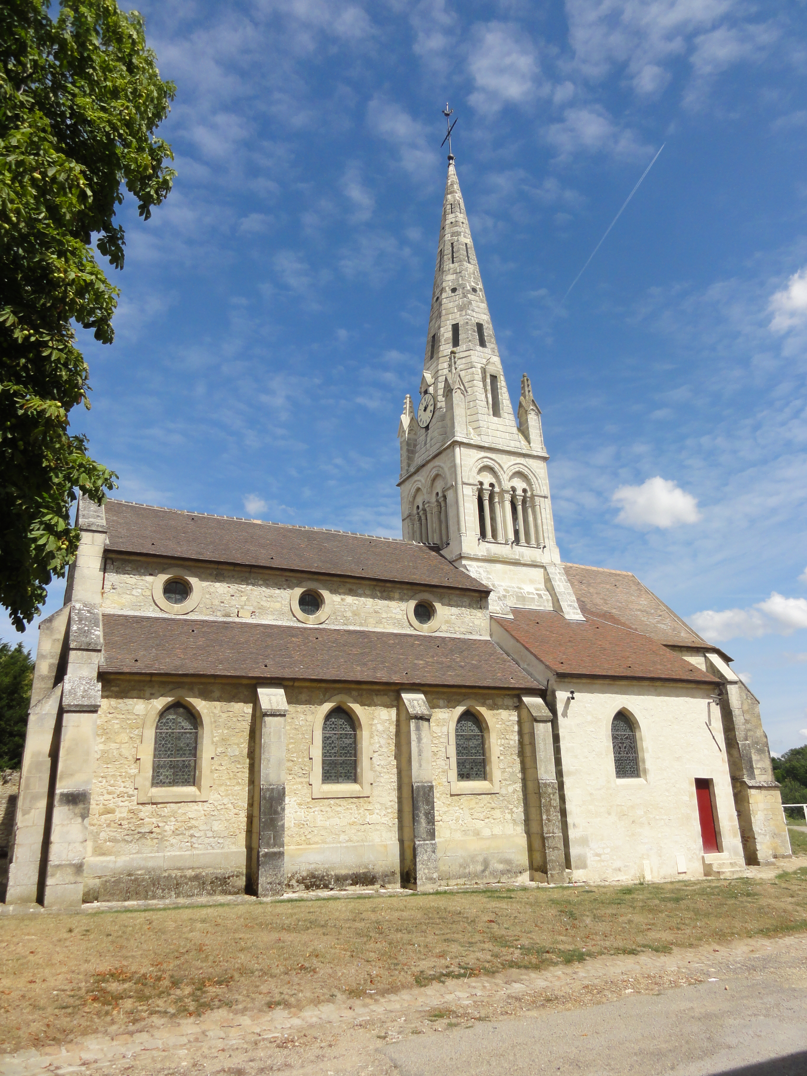 Église Saint-Martin de Néry (voir titre).